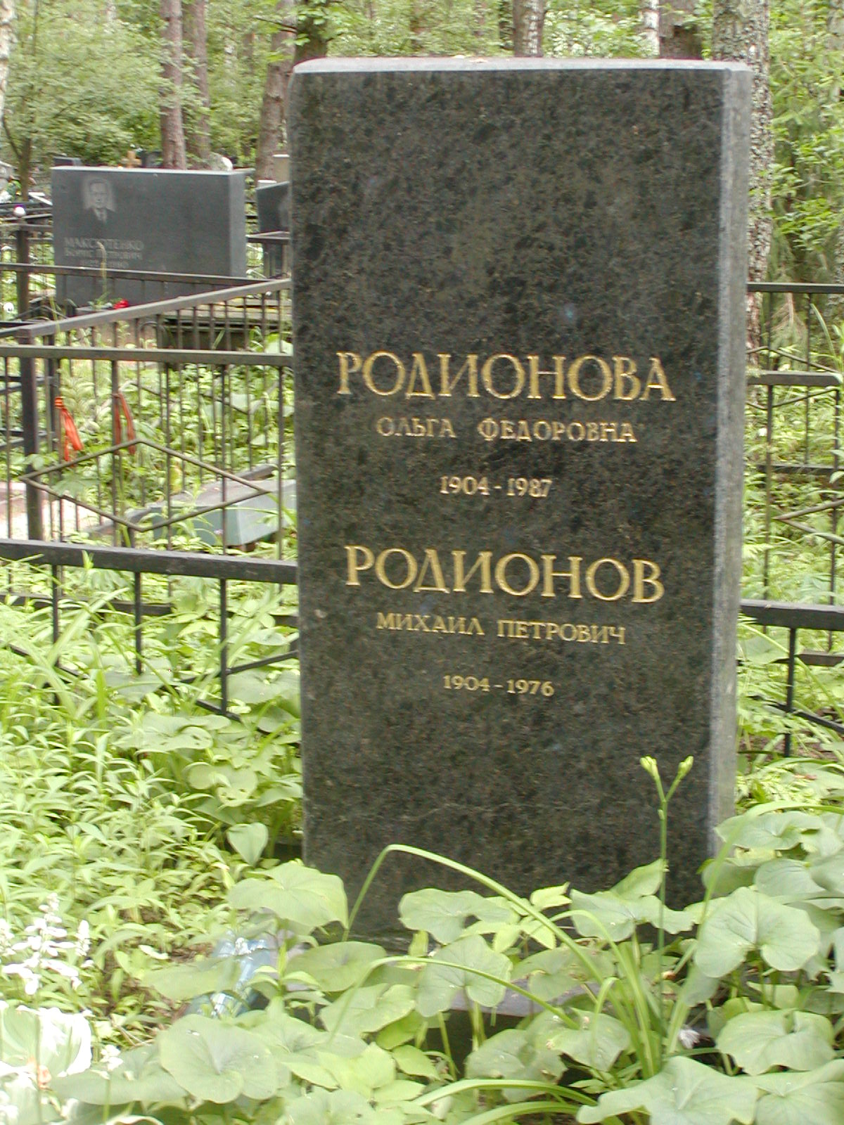 Надгробный памятник Михаилу Петровичу Родионову на Кончаловском кладбище в Обнинске